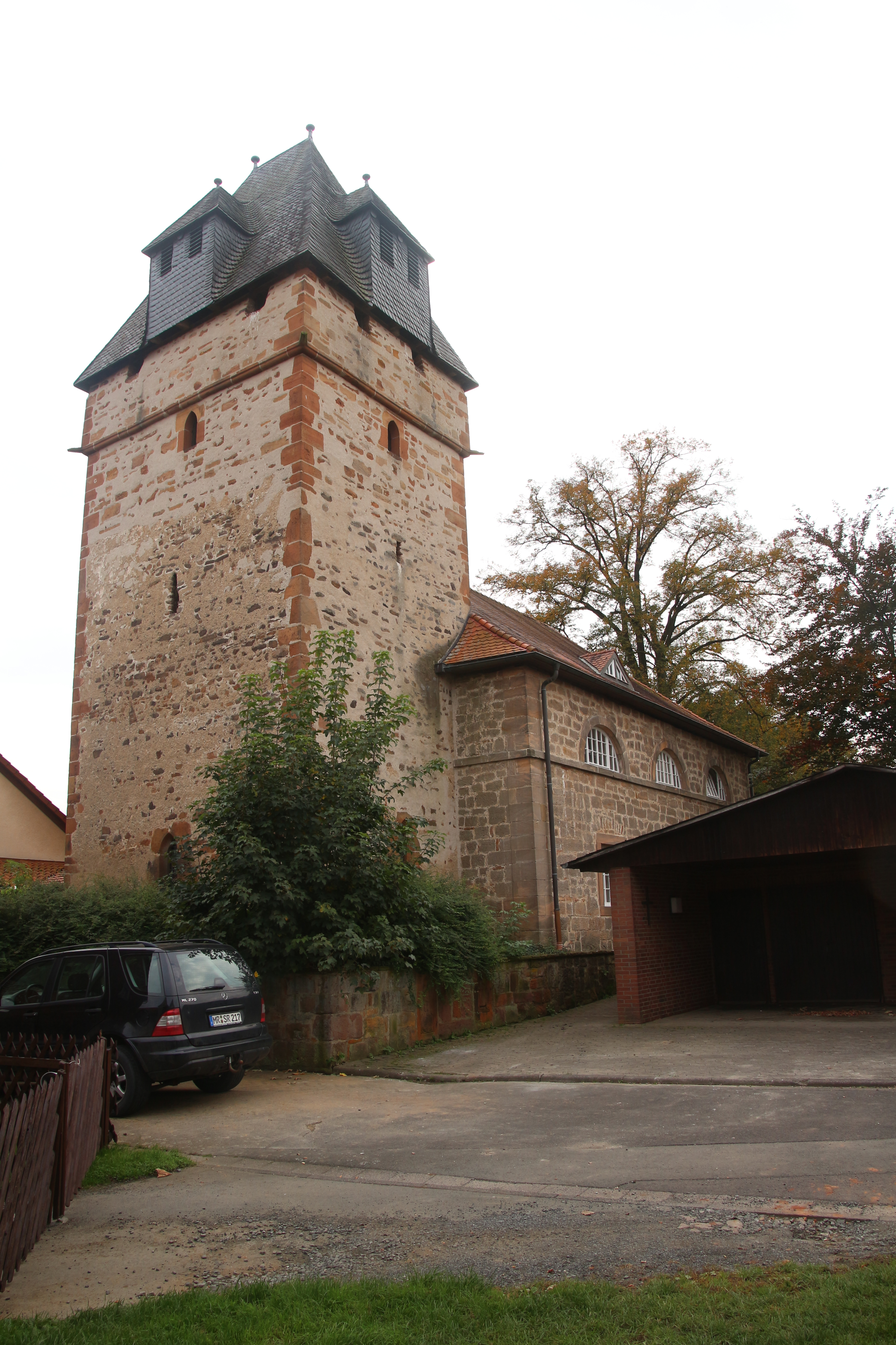 Evangelische Kirche Sterzhausen, Gemeinde Lahntal, Landkreis Marburg-Biedenkopf, Hessen